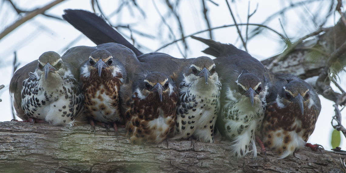 Subdesert Mesite - Reniala Reserve - Ifaty - Madagascar_S4E8646